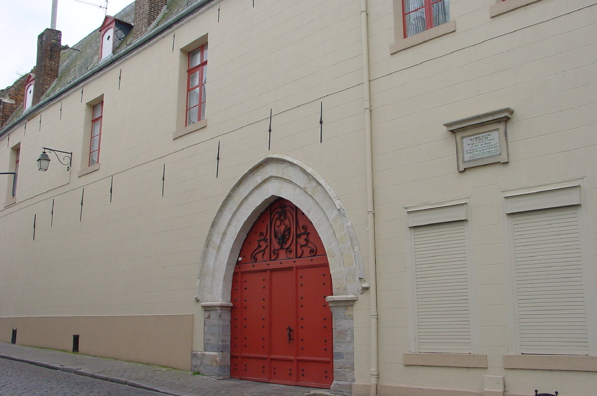 Façade de l'hôtel de Saint-Pol à Cambrai, où fut signée la Paix des Dames en 1529